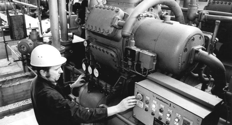 VEB Carl Zeiss Jena, energiesparende Kälteanlage ADN-ZB-Kasper 29.4.1987 Neue energiesparende Kälteanlage Im Präzisionsgerätebau des Kombinates Carl Zeiss Jena (Bezirk Gera) entstand die erste Großanlage zur Kälteherstellung, die nach dem Kälte-Wärme-Kopplungsprinzip - ähnlich wie ein Kühlschrank - arbeitet. Sie dient der Bereitstellung von Kaltwasser für die Klimatisierung von Produktionsräumen bzw. für Produktionsprozesse. Gegenüber der bisherigen Technologie der Kälteerzeugung spart die neue Anlage ein Viertel an Wärme und Elektroenergie ein.